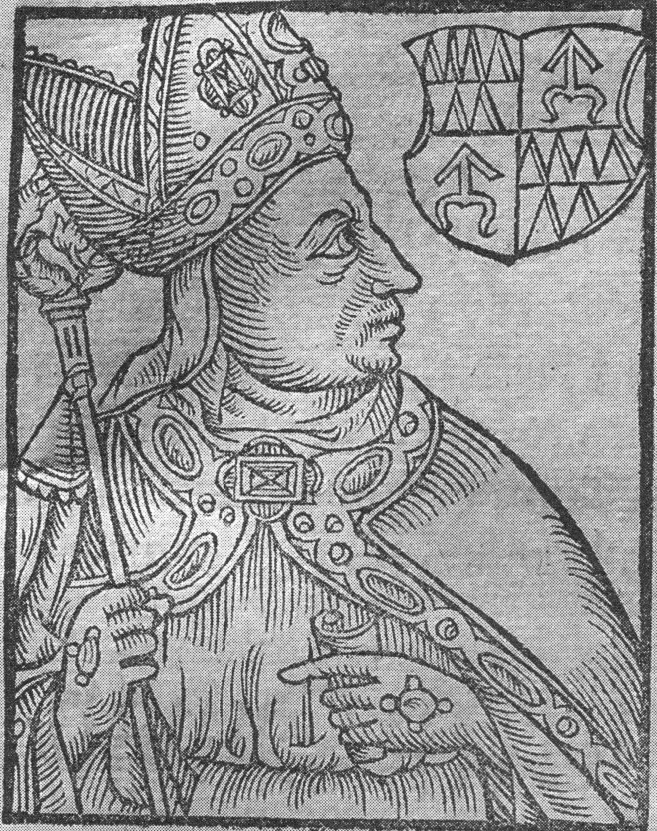 Lacek z Kravař, biskup